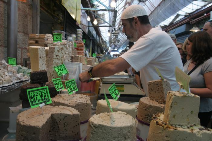 שוק מחנה יהודה ירושלים מוכר חלבה